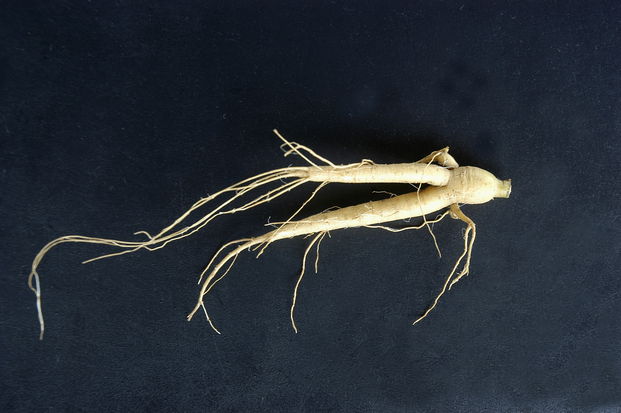 Raiz de paratudo, Ginseng brasileiro (Pfaffia glomerata)